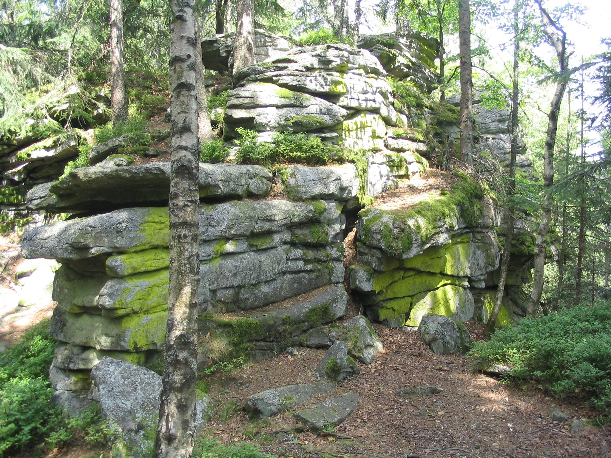 Bischofsmais, Felsenam Teufelstisch, aufgenommen am 26.07.2007 von Dr. Hagen Graebner